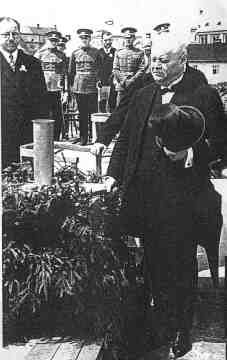 Josef Kożdon